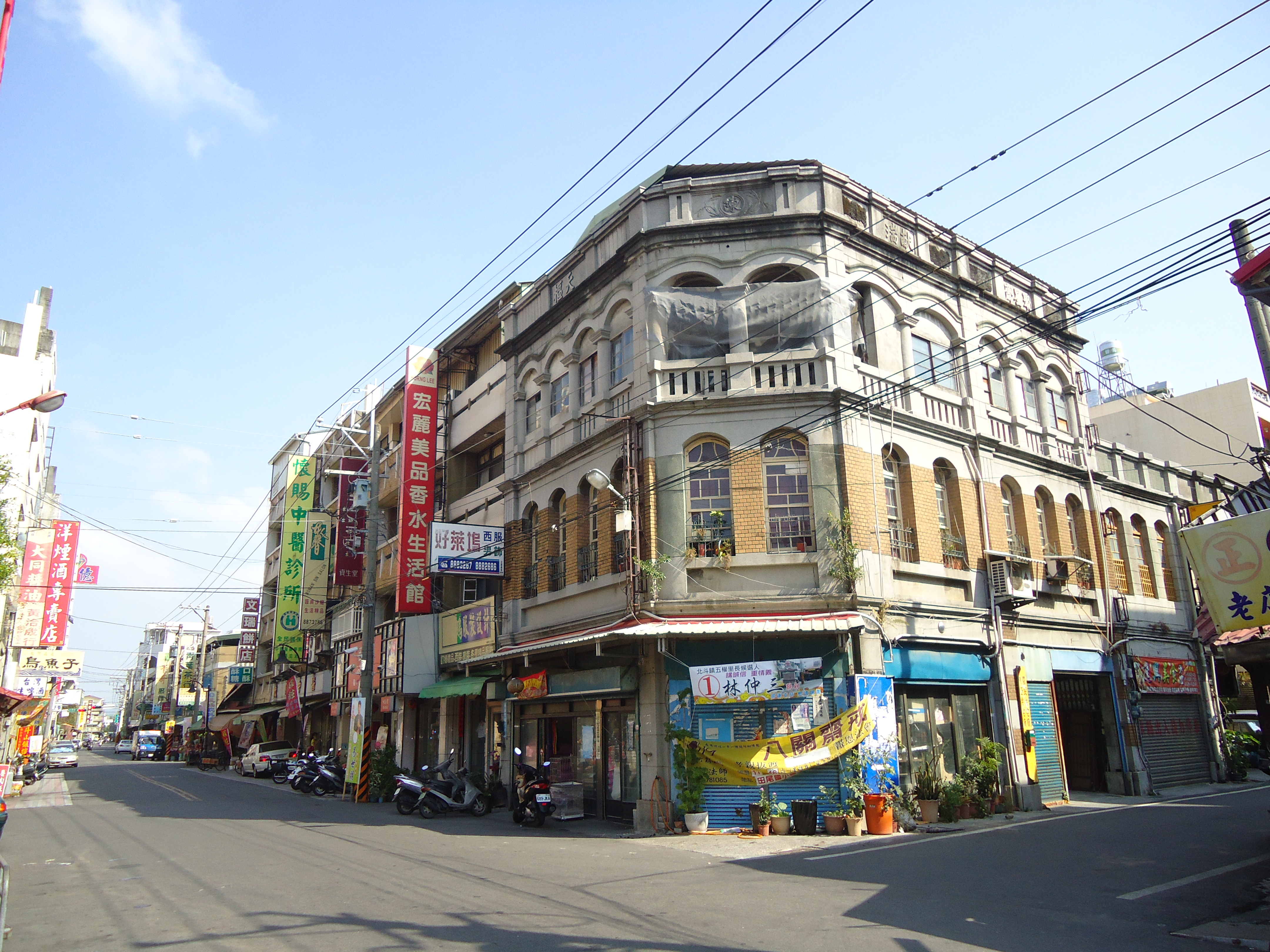 北斗鎮斗苑路歷史建築